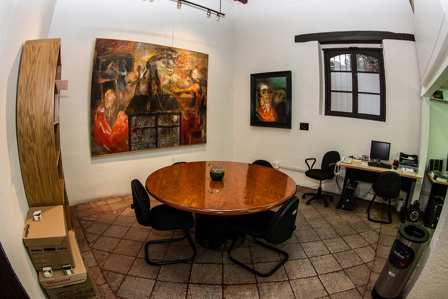 Imagen del interior de el Centro Cultural Vlady de la Universidad Autónoma de la Ciudad de México